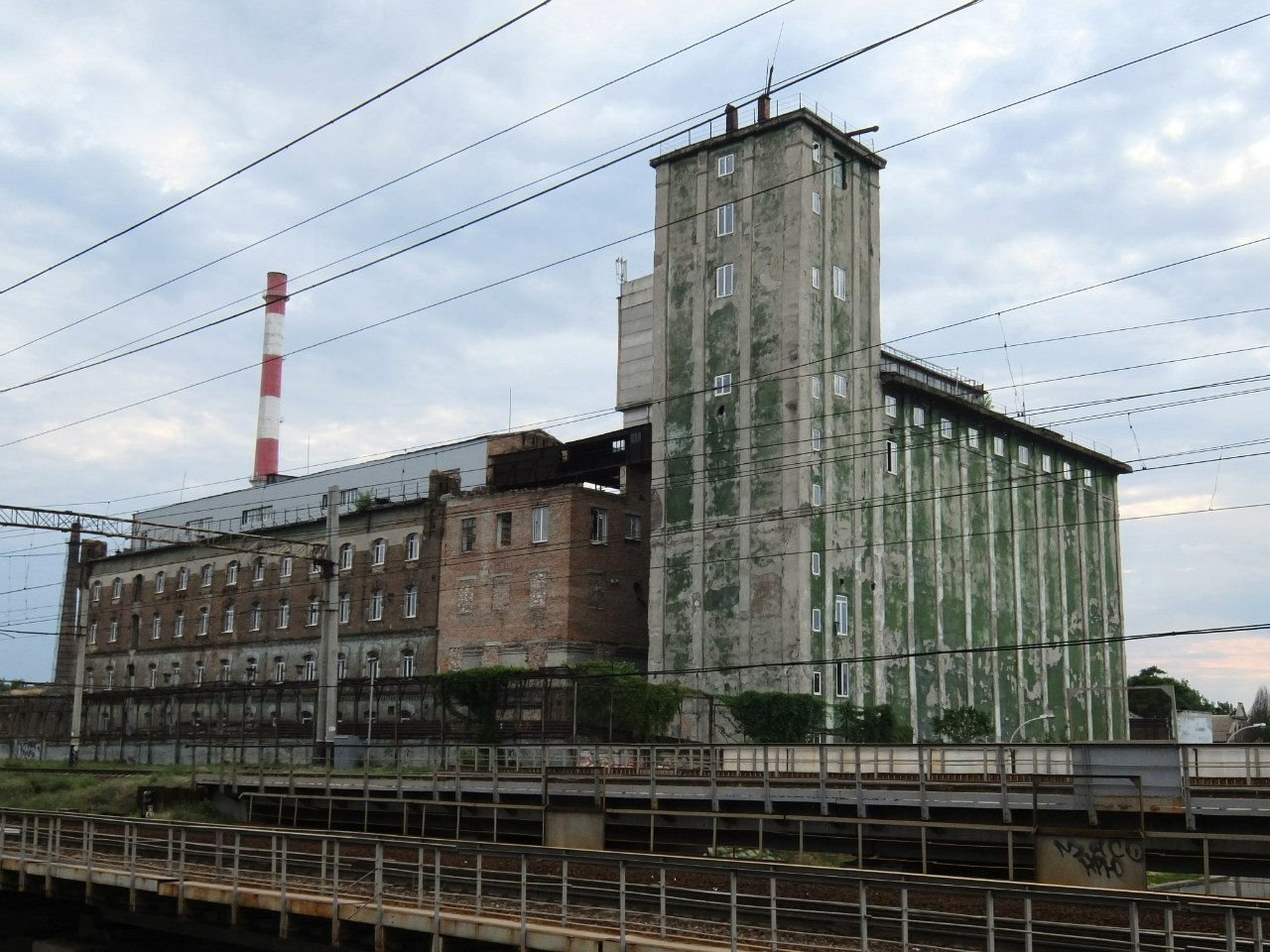 Млин Г.А. Нібура (зараз Запорізький комбінат хлібопродуктів), Запоріжжя, вул. Комсомольська, 32 (30)